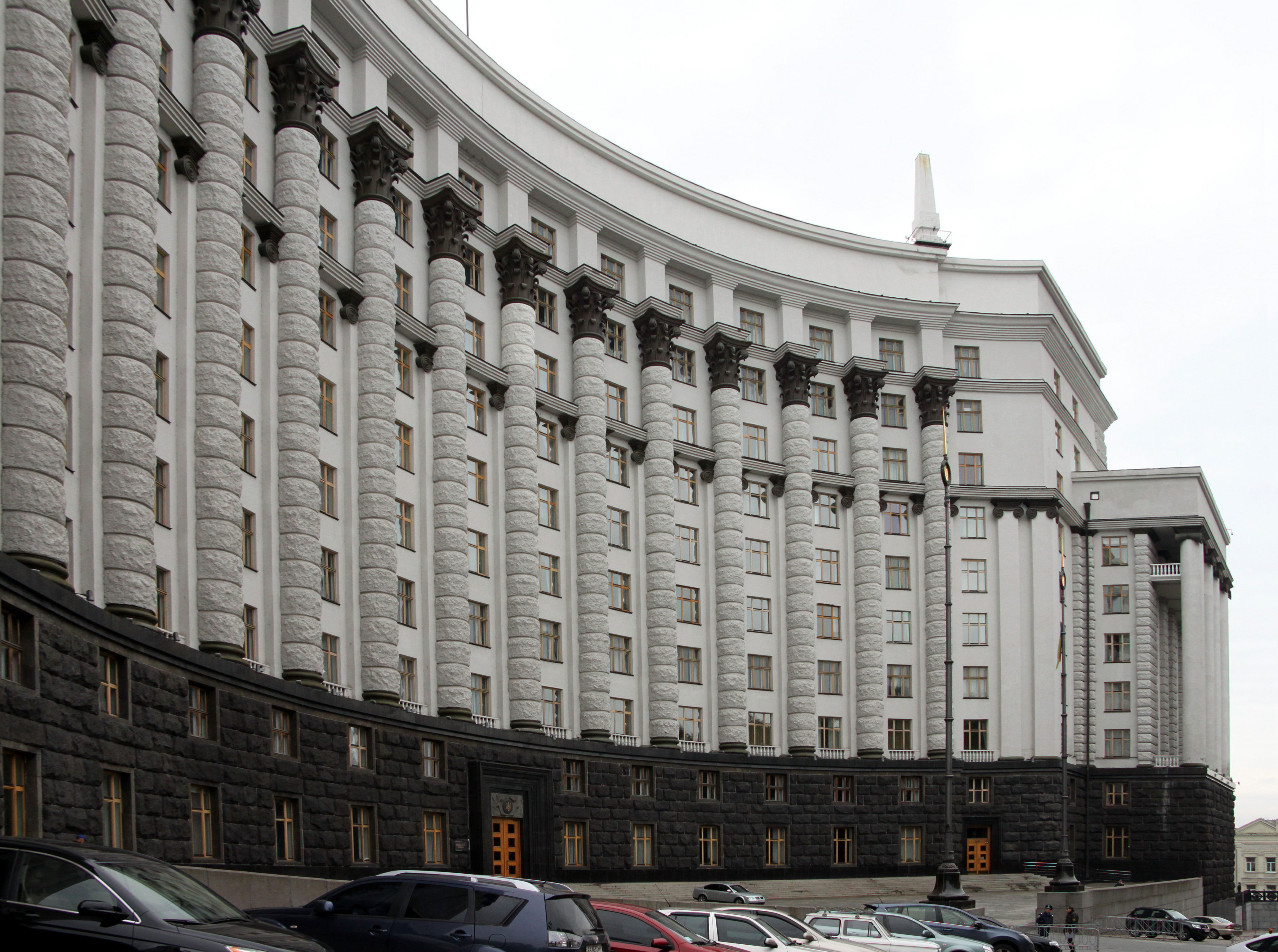 Будинок Ради народних комісарів УРСР (Будинок уряду України), Київ, Грушевського Михайла вул., 12/2